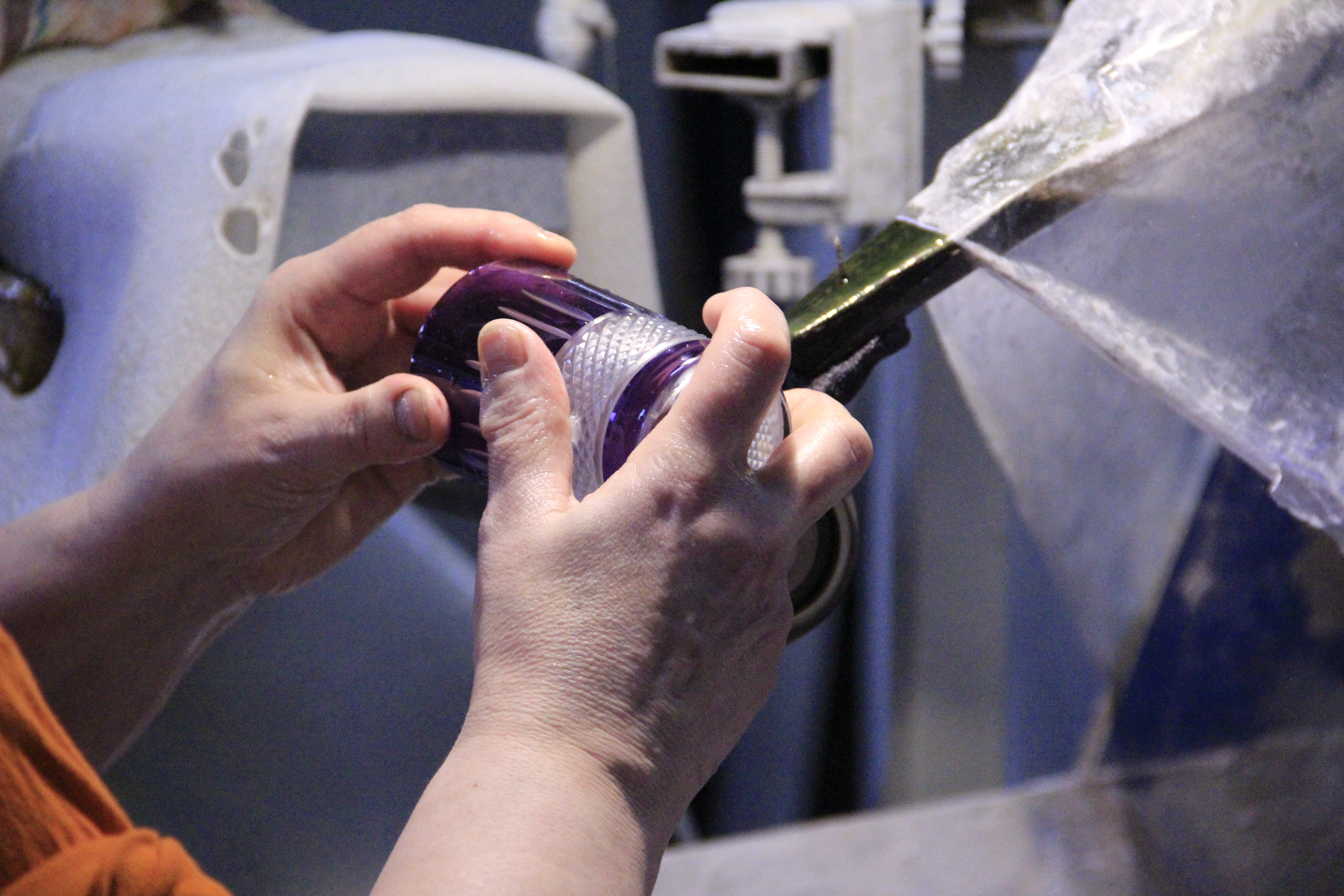 Piechowice, Huta Julia - produkcja